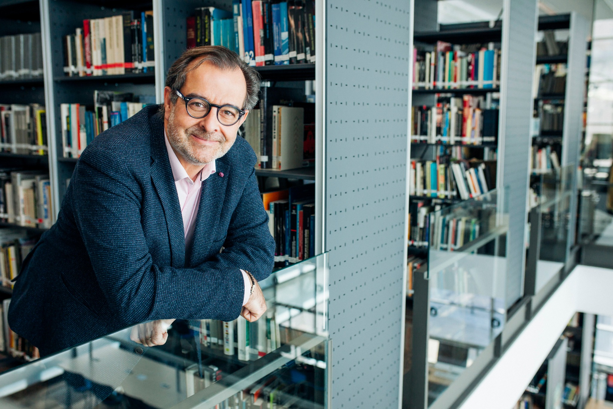 Albert Sáez en la biblioteca de la factultad Blanquerna de la Universidad Ramón Llull